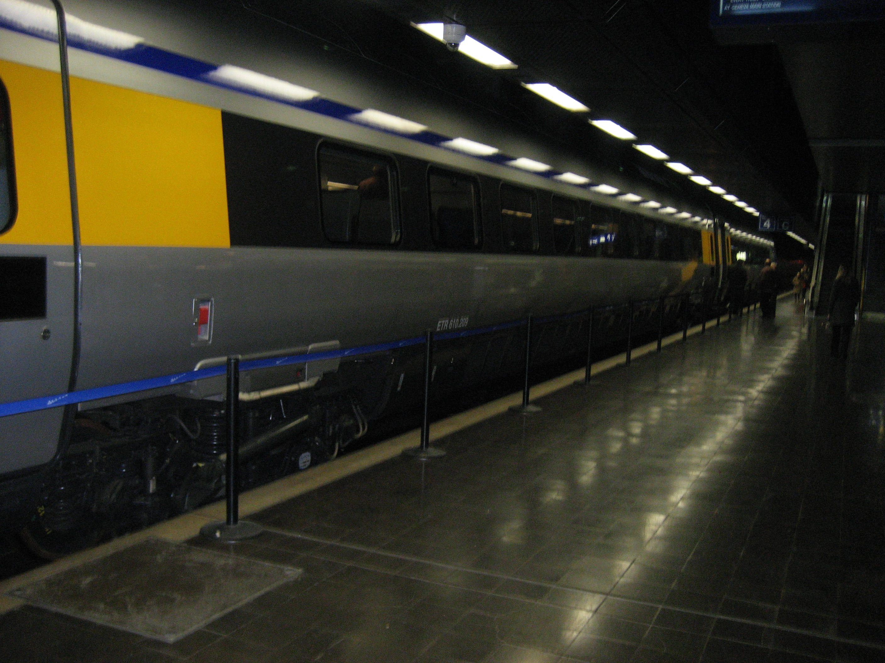 carrozie ETR 610.209